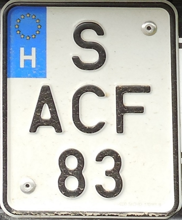 Ungarisches Mopedkennzeichen